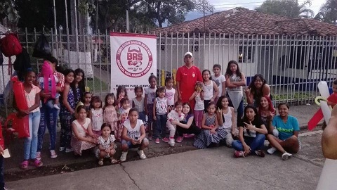 Donaciones hechas por la Fundación Barón Rojo Sur (Barra del América de Cali)